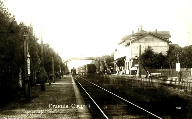 Железнодорожная станция Озерки под Петербургом. Со старой открытки (postcard)